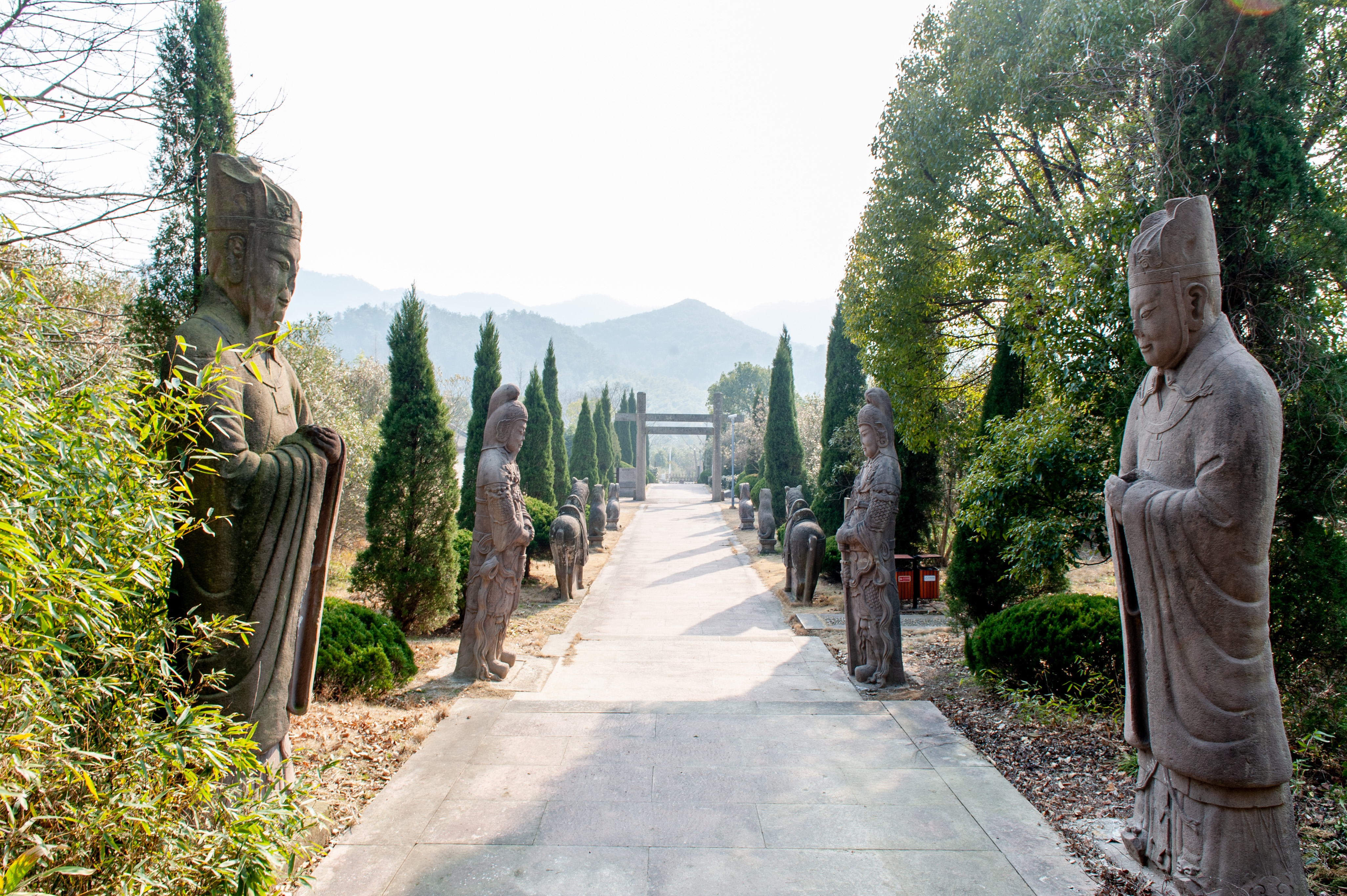 史渐墓道，位于南宋石刻公园